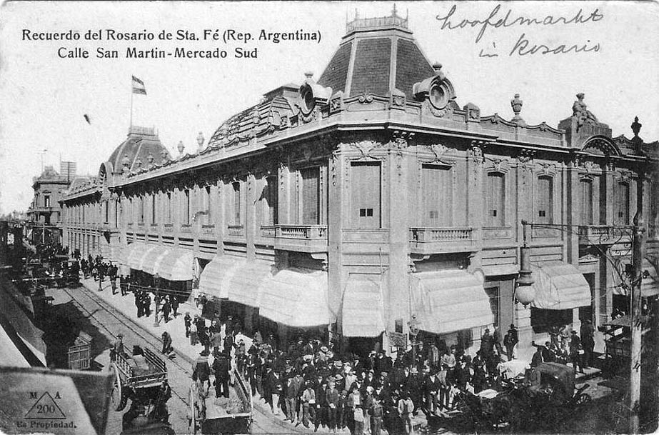 Vista del Mercado Sud en la calle San Martin esq. San Luis de Rosario, hacia 1903 cuando fue reconstruido. Actual Plaza Montenegro.